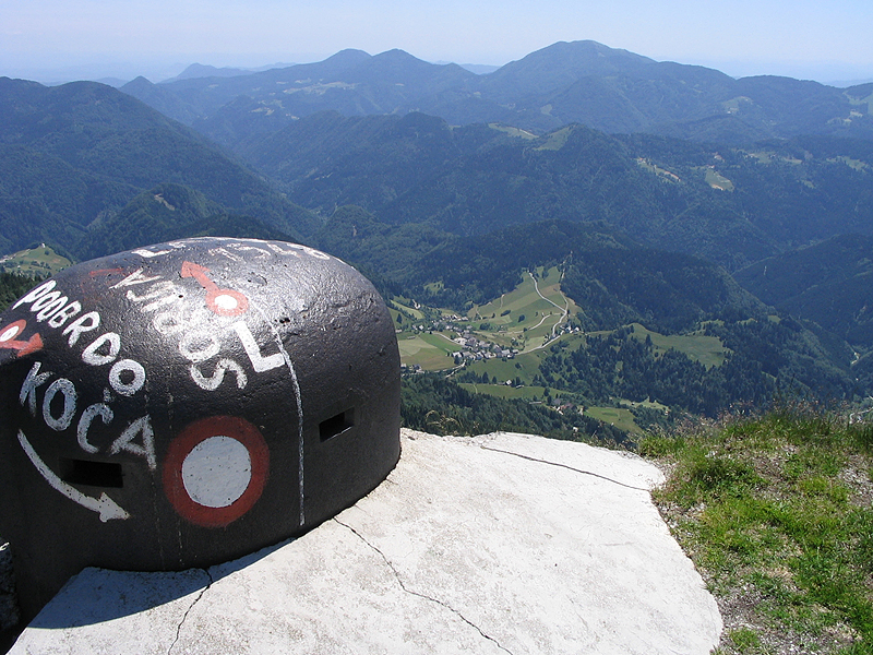 Opazovalna kupola na Lajnarju